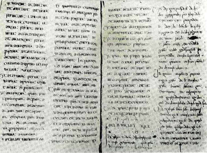 მრავალთავი